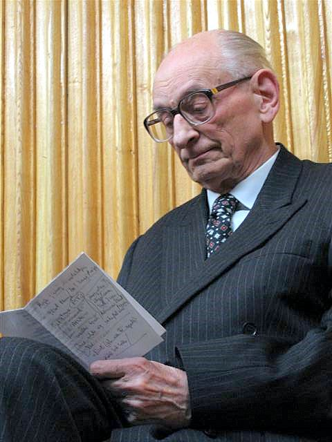 Władysław Bartoszewski (1922-2015), Polish historian, writer and politician